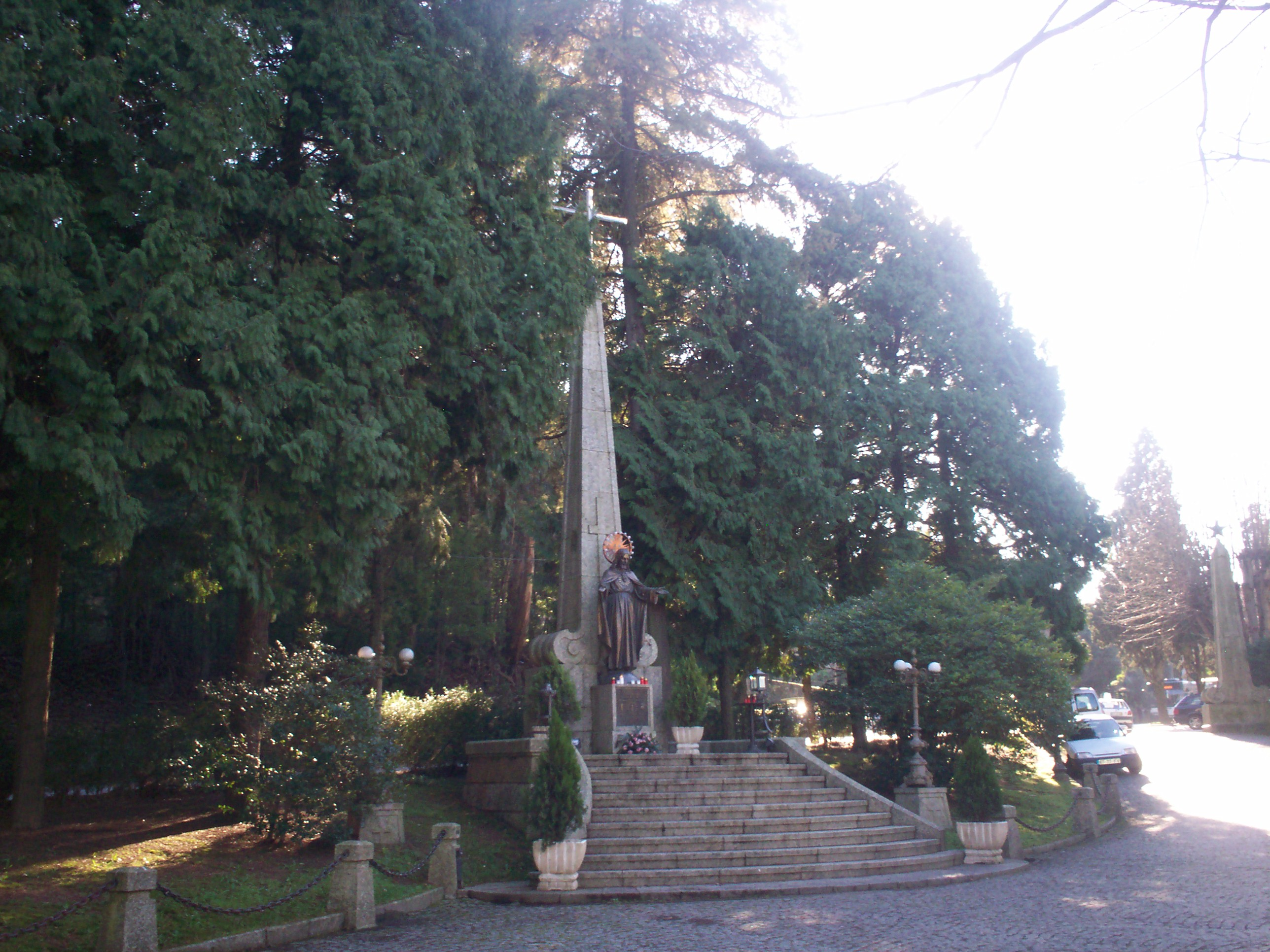 Adro da Igreja de Riba de Ave